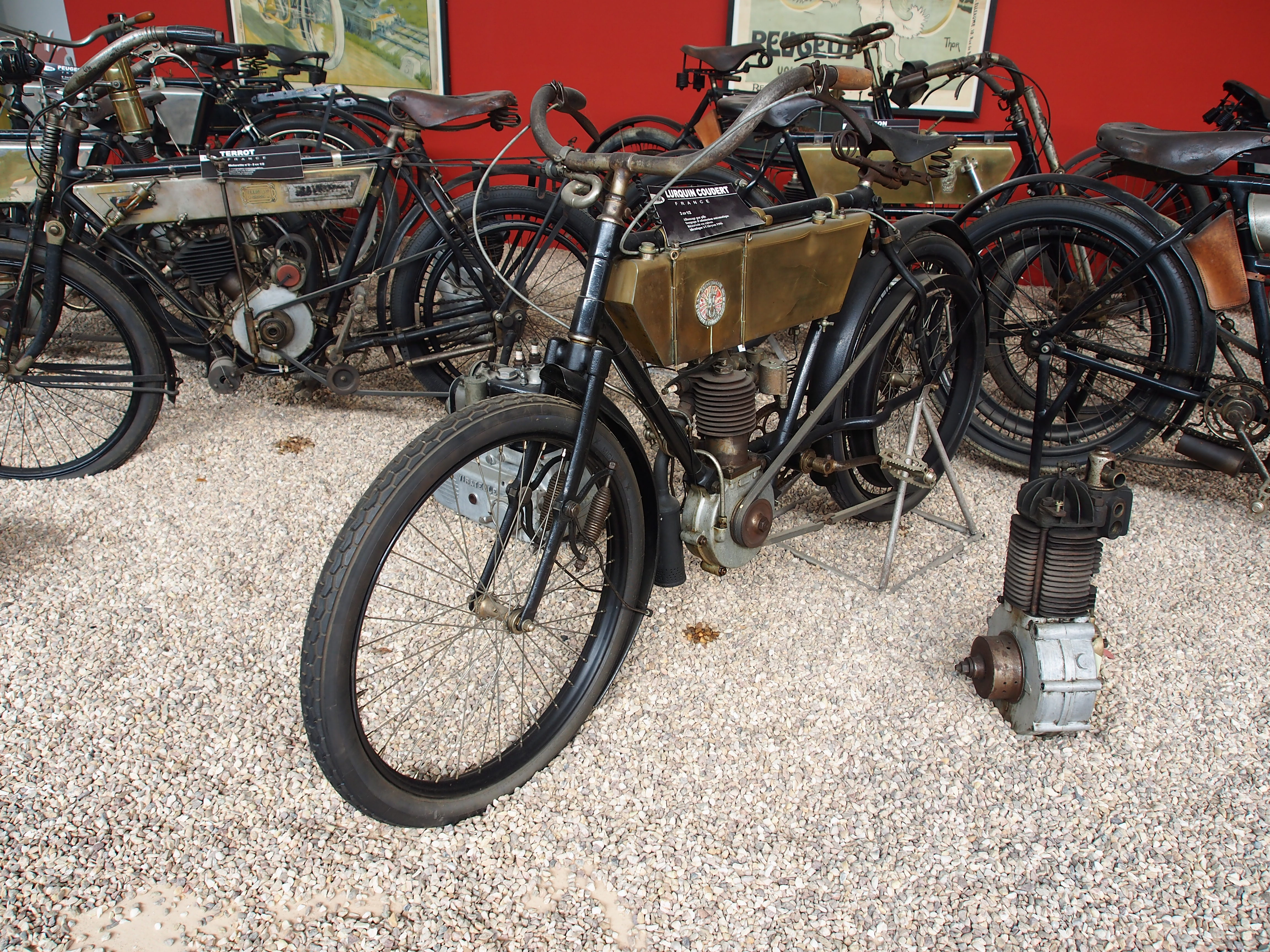 Photographed at the Musée de la Moto et du Vélo, Amneville, France.